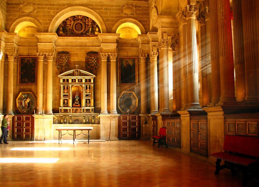 Interior de la sacristía de la Catedral de Jaén, obra de Andrés de Vandelvira.